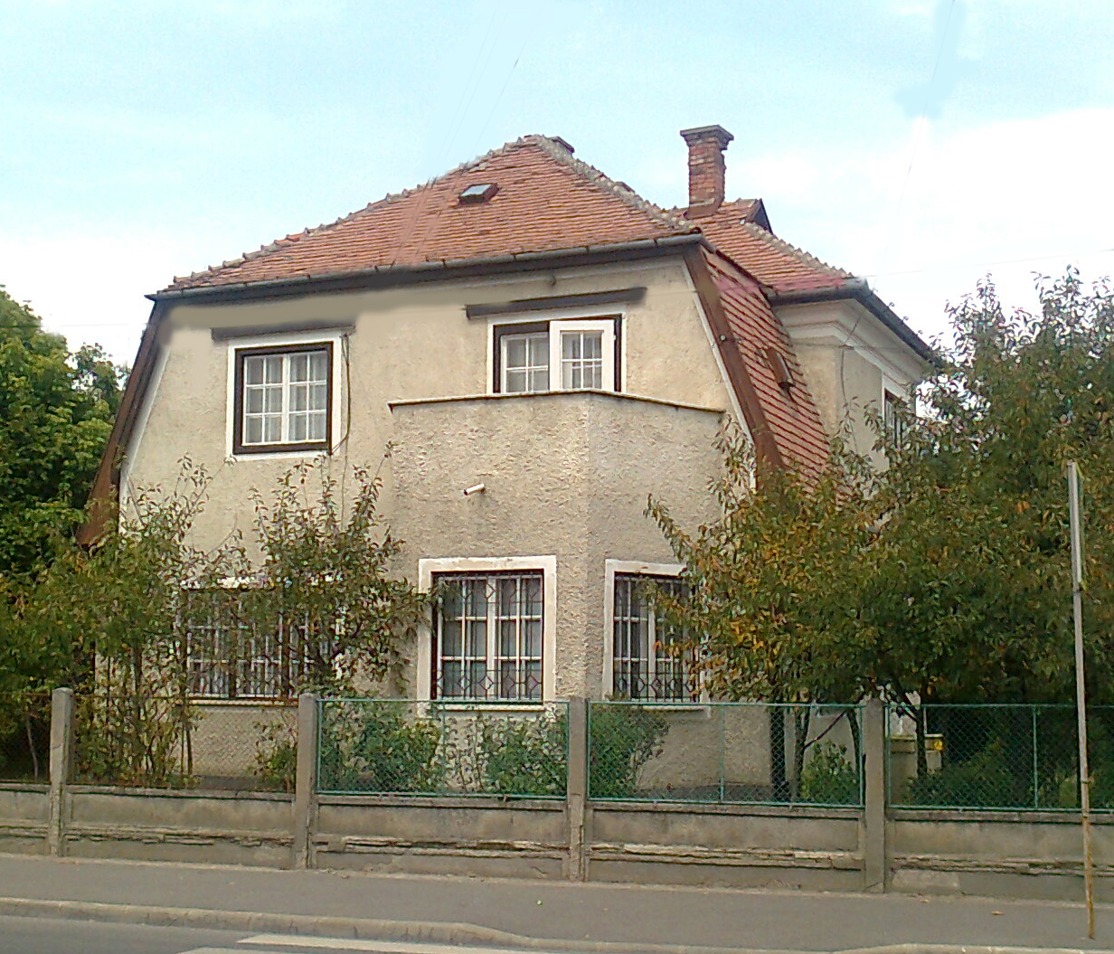 Kolozsvári Moll-ház, a KAB székháza (I. Ghica utca 12)